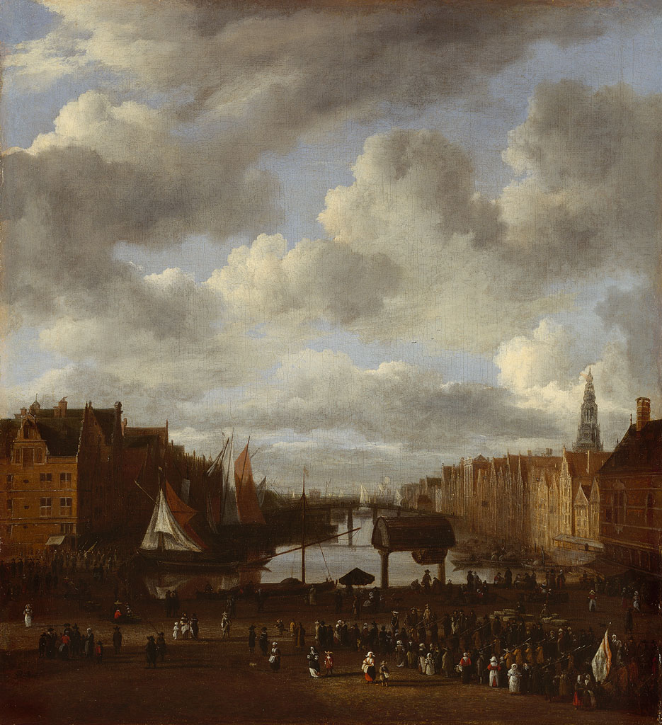 schilderij; stadsgezicht; stadsgezicht Amsterdam; Damrak; Oude Kerk; Dam